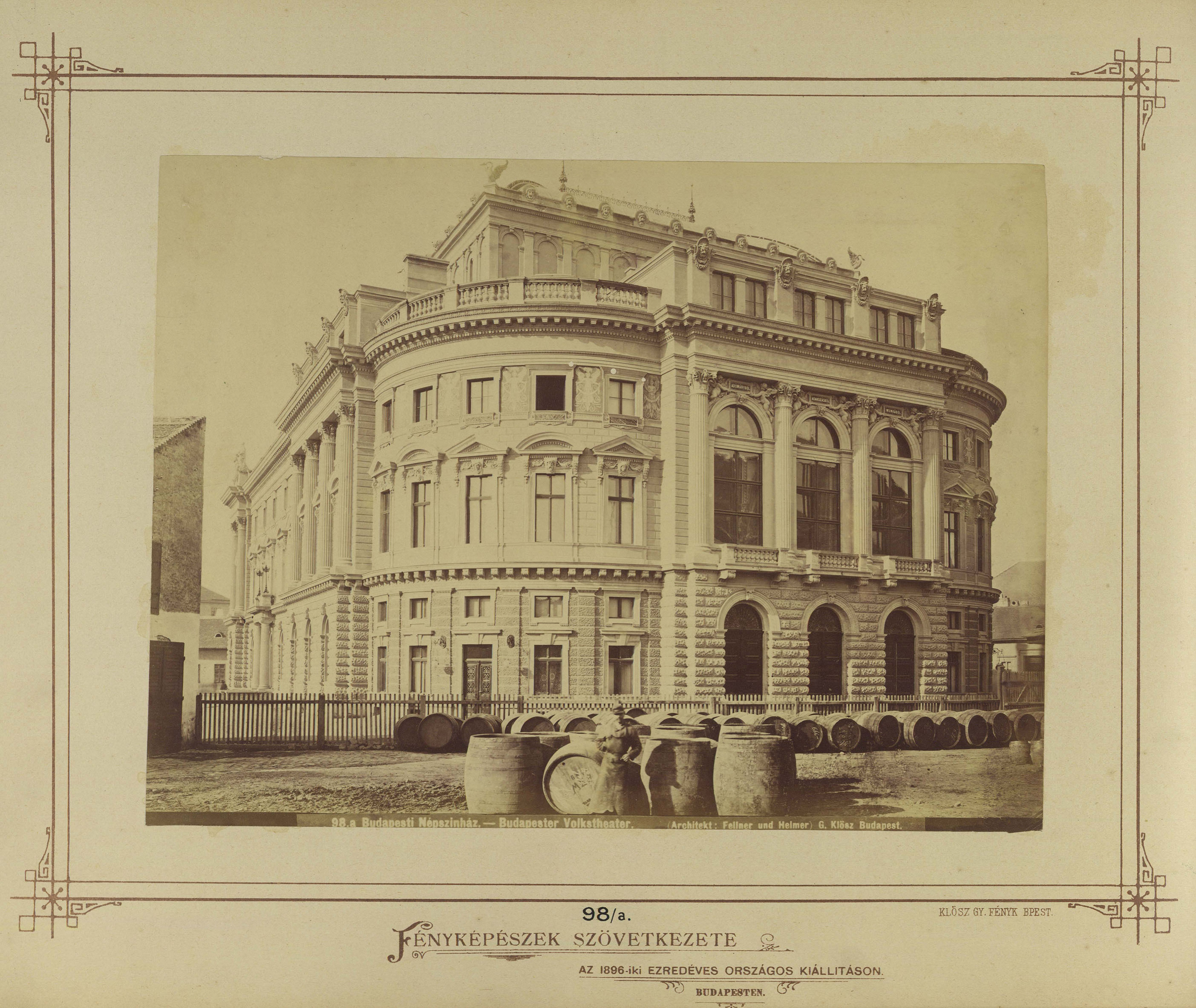 Népszínház (a későbbi Nemzeti Színház) a mai Blaha Lujza téren a József körút felől nézve. A felvétel 1875 körül készült. A kép forrását kérjük így adja meg: Fortepan / Budapest Főváros Levéltára. Levéltári jelzet: HU.BFL.XV.19.d.1.05.104 Location: Hungary, Budapest VIII. Tags: Fellner and Helmer-design, Budapest, barrel